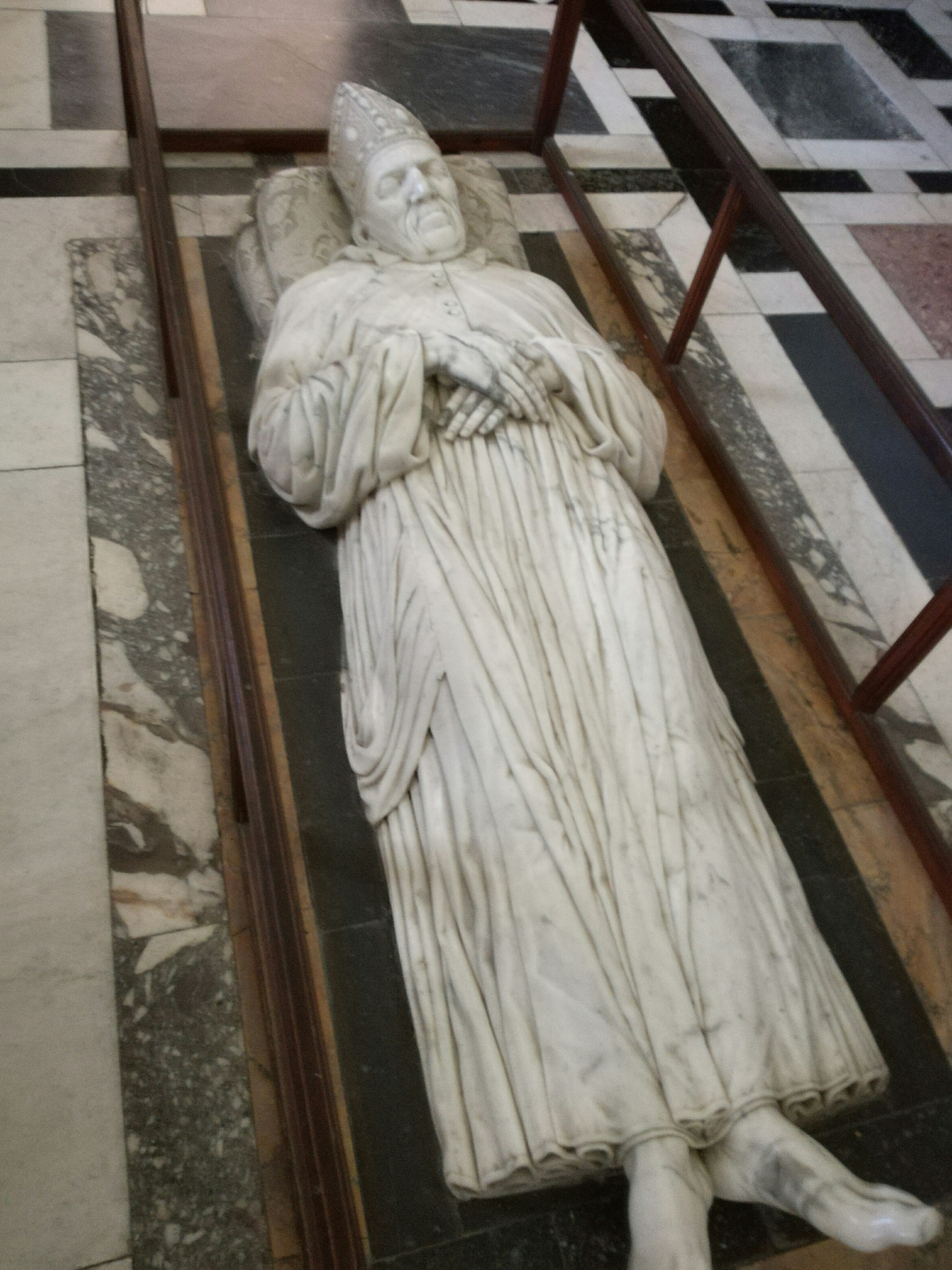 Sepolcro di Don Leonardo Buonafé di francesco da Sangallo